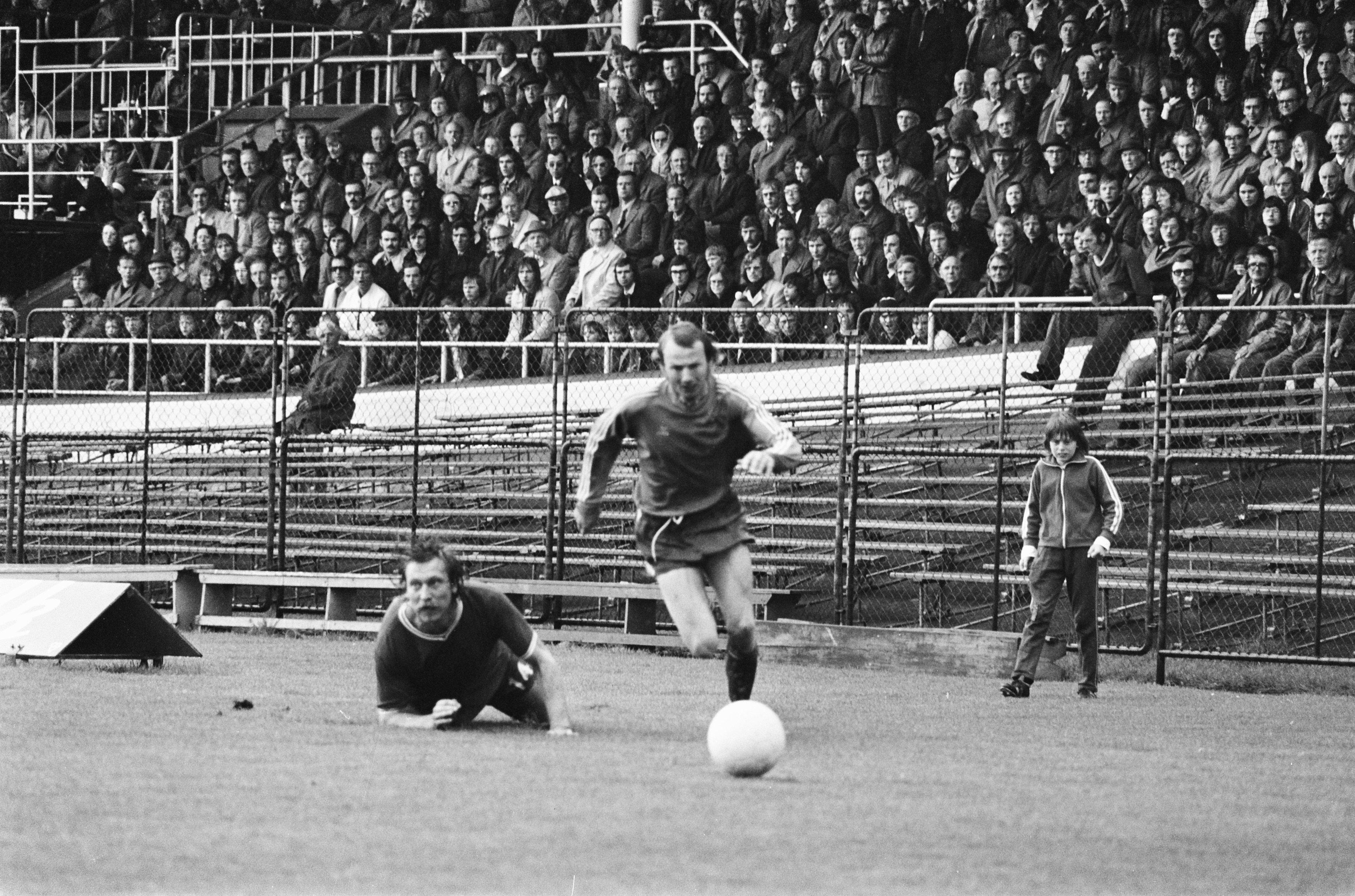 Collectie / Archief : Fotocollectie Anefo Reportage / Serie : FC Utrecht-NAC 0-1 Beschrijving : Frans Bouwmeester (NAC) ontdoet zich van Joop van Maurik (FC Utrecht) Datum : 4 mei 1975 Locatie : Utrecht, Utrecht (prov.) Trefwoorden : spelers, sport, voetbal, wedstrijden Persoonsnaam : Bouwmeester, Frans, Maurik, Joop van Fotograaf : Verhoeff, Bert / Anefo Auteursrechthebbende : Nationaal Archief Materiaalsoort : Negatief (zwart/wit) Nummer archiefinventaris : bekijk toegang 2.24.01.05 Bestanddeelnummer : 927-9120